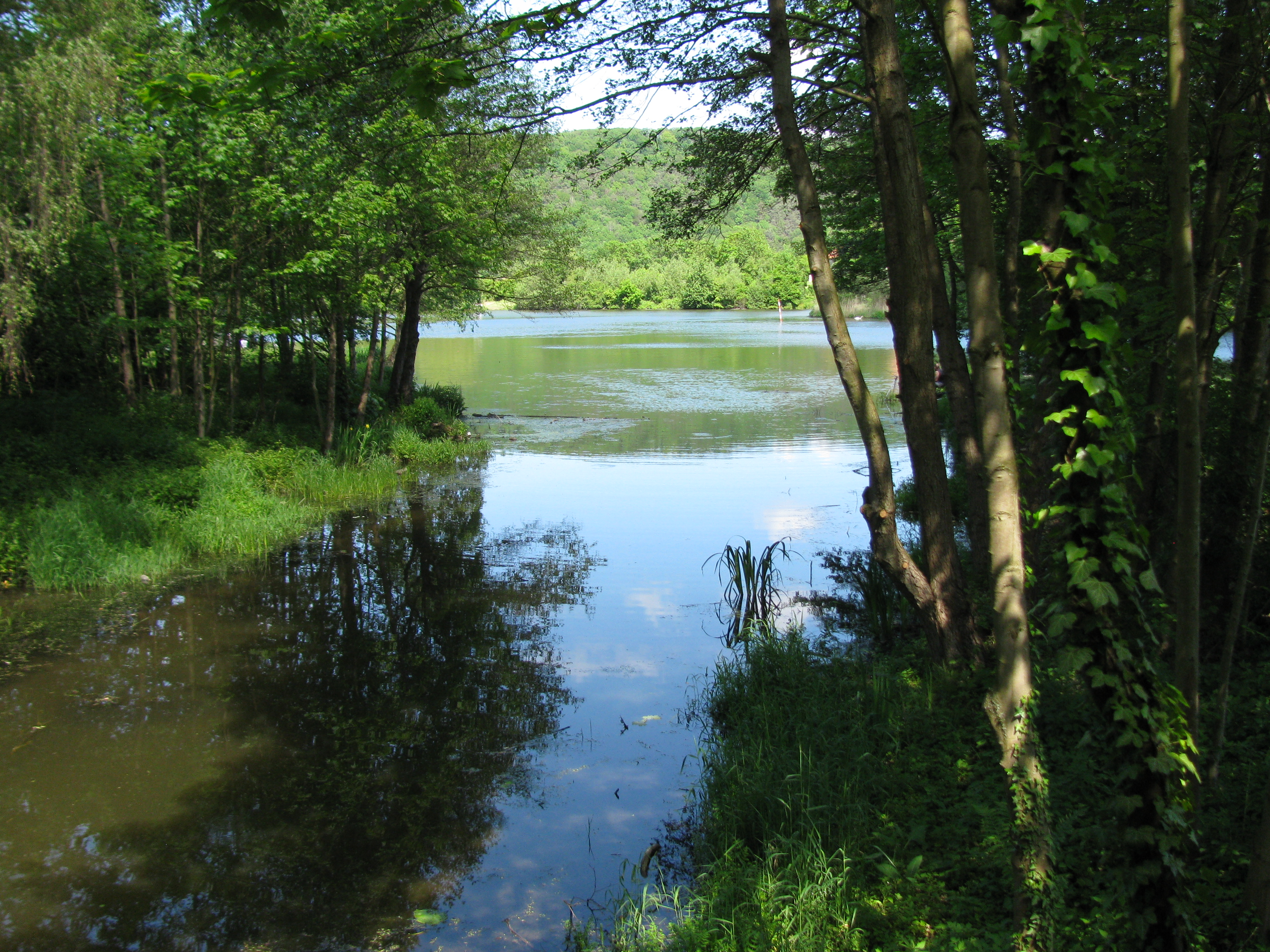 die Mündung der Espe in die Fulda